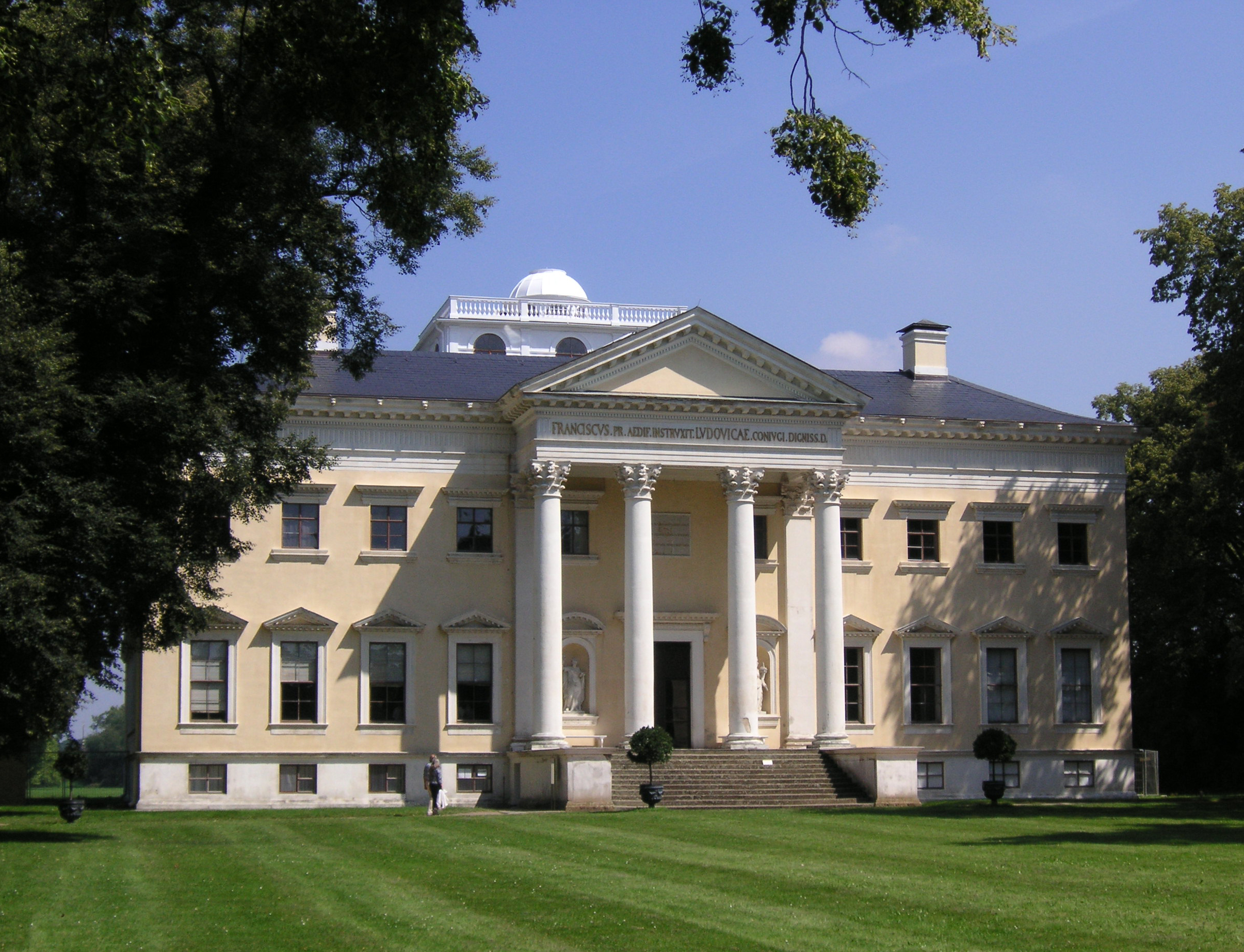 Castle in Wörlitz near Dessau, Germany